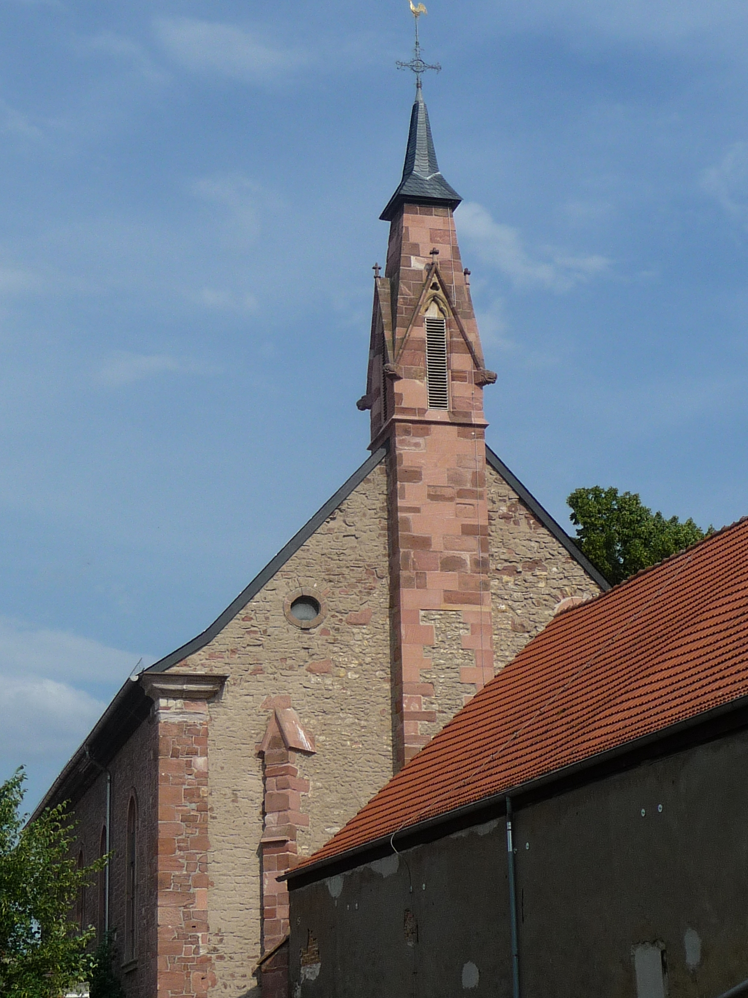 Osthofen ist eine Stadt im so genannten Wonnegau im rheinland-pfälzischen Landkreis Alzey-Worms.